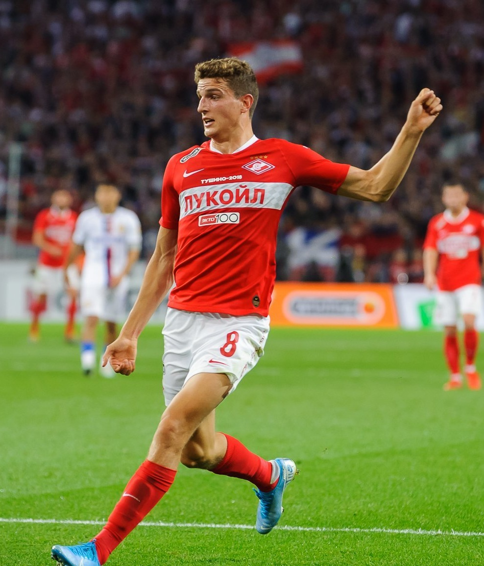 Гус Тил (Тиль) в составе московского «Спартака» в матче против московского ЦСКА